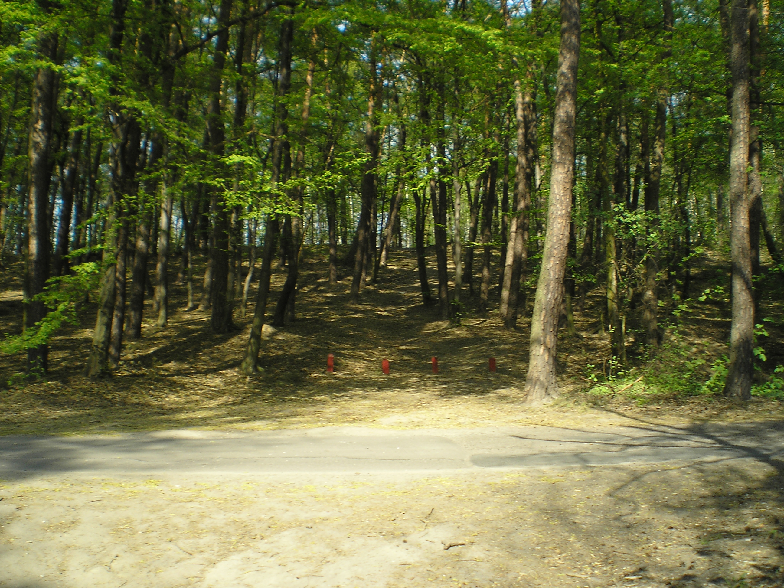 Łódź - Las Popioły na Rudzie Pabianickiej